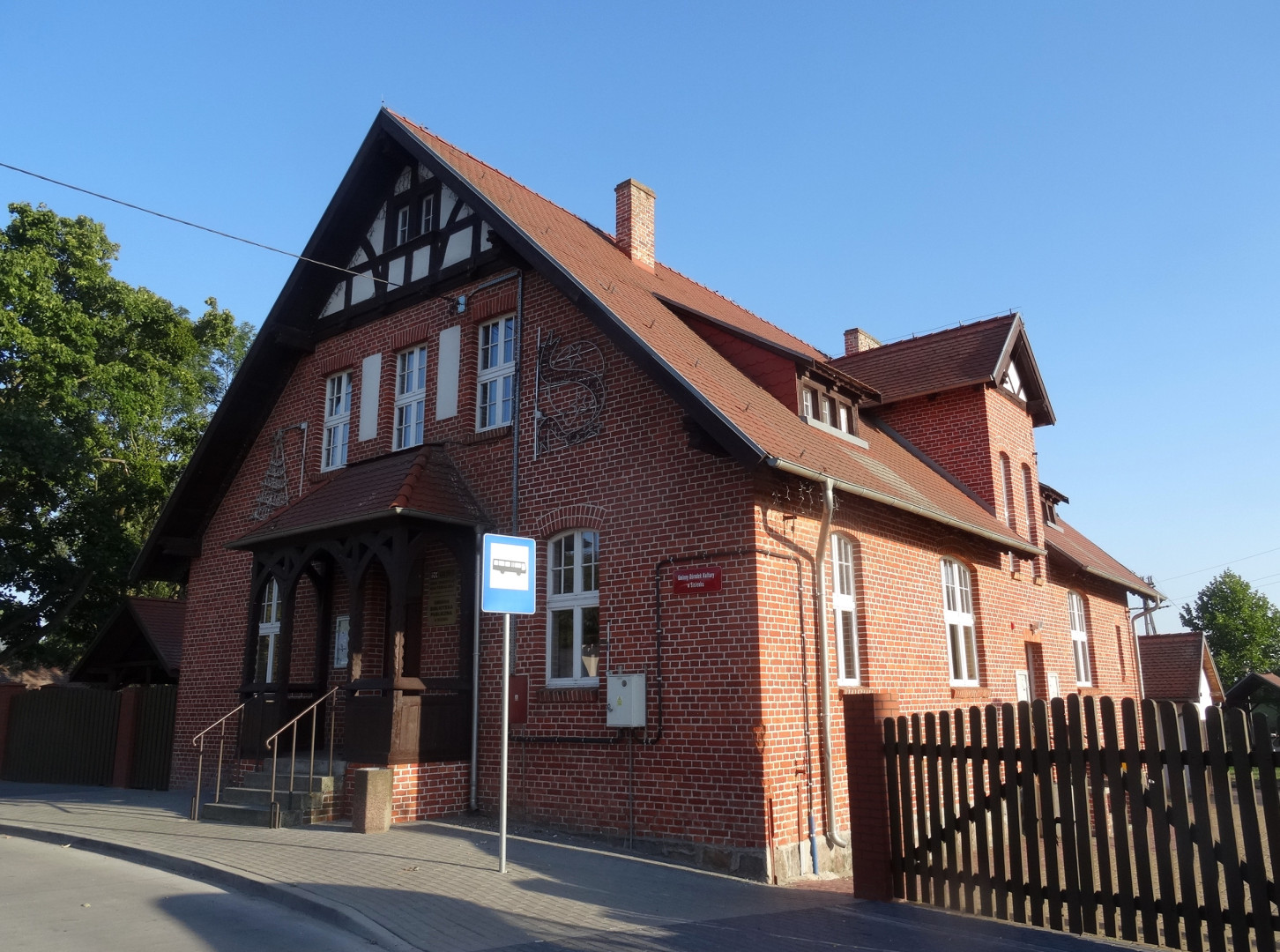 Sicienko - wieś gminna w powiecie bydgoskim, woj. kujawsko-pomorskie; na zdj. Gminny Dom Kultury